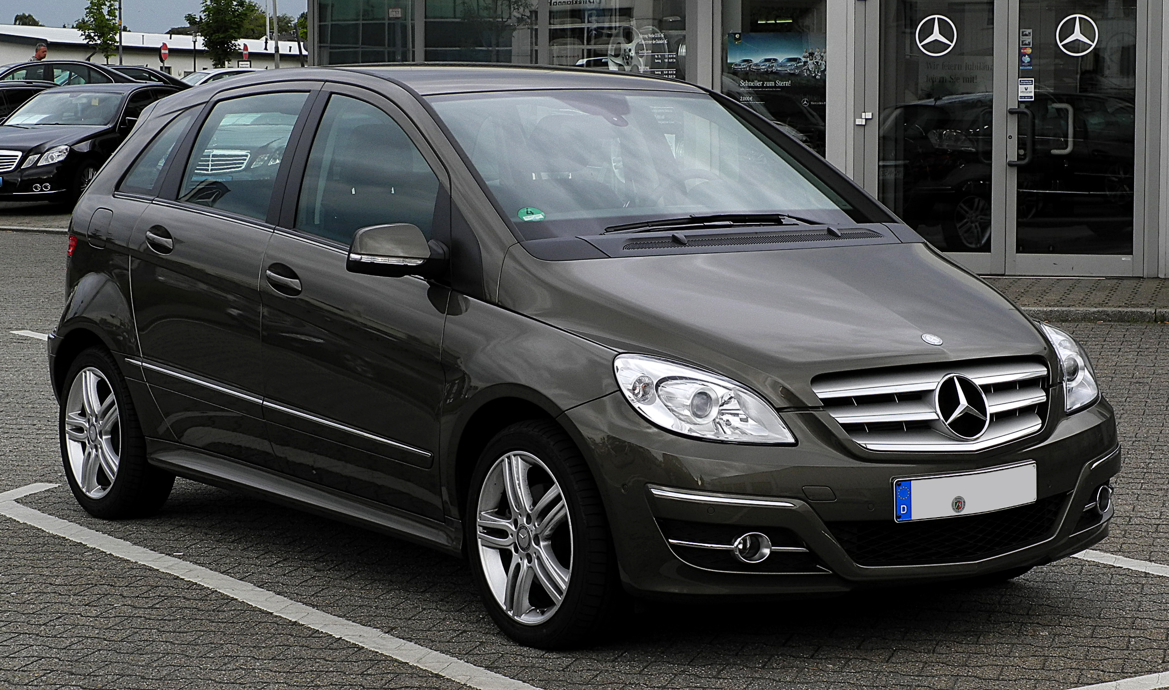 Mercedes-Benz B 180 CDI (T 245, Facelift)